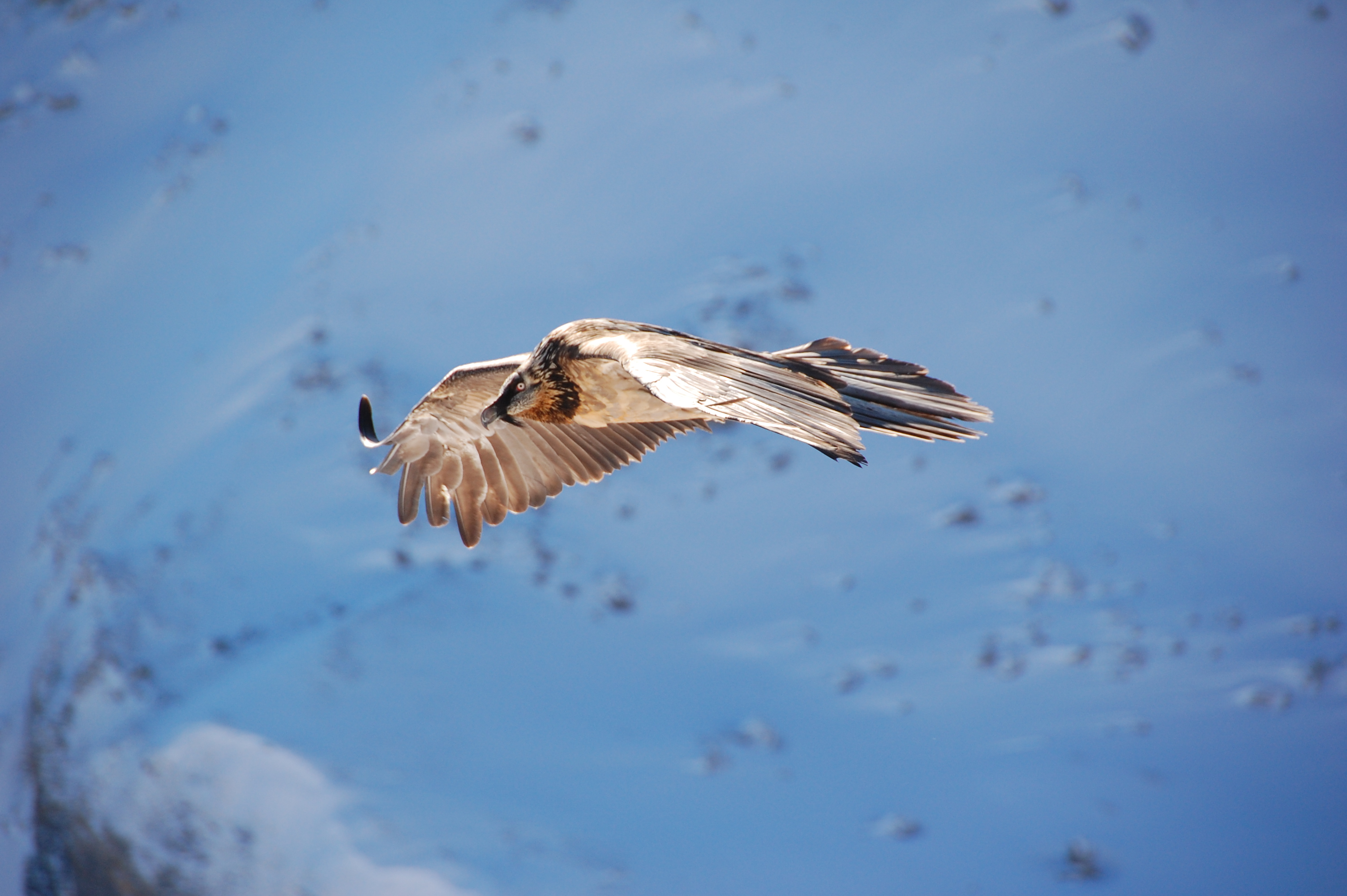 Lammergeier Gypaetus barbatus, immature; Mürren, Berne, Switzerland (reintroduced population).